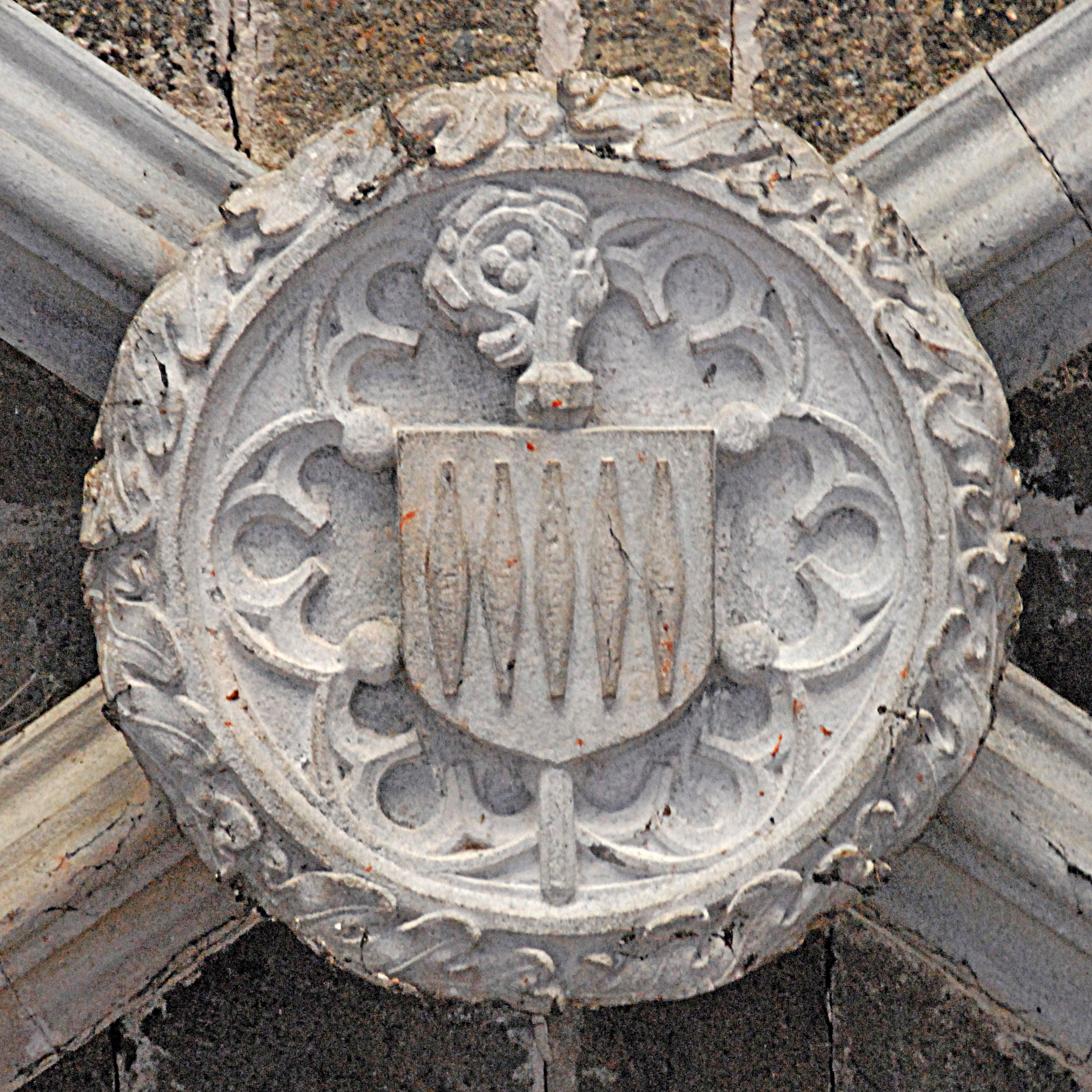 Chanteuges, Chapelle St.-Anne, Schlussstein Joch 1